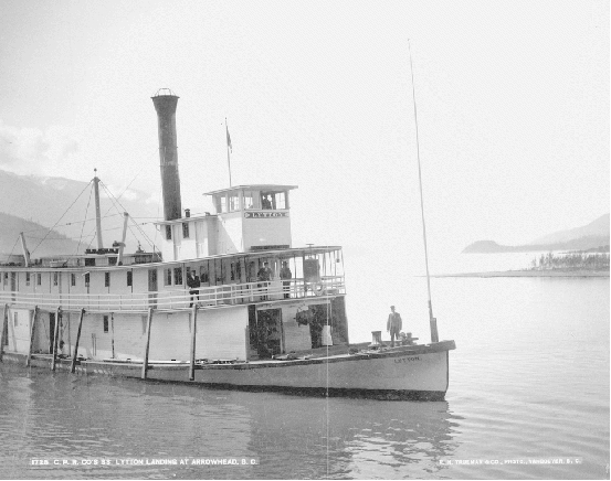 Lytton sternwheeler